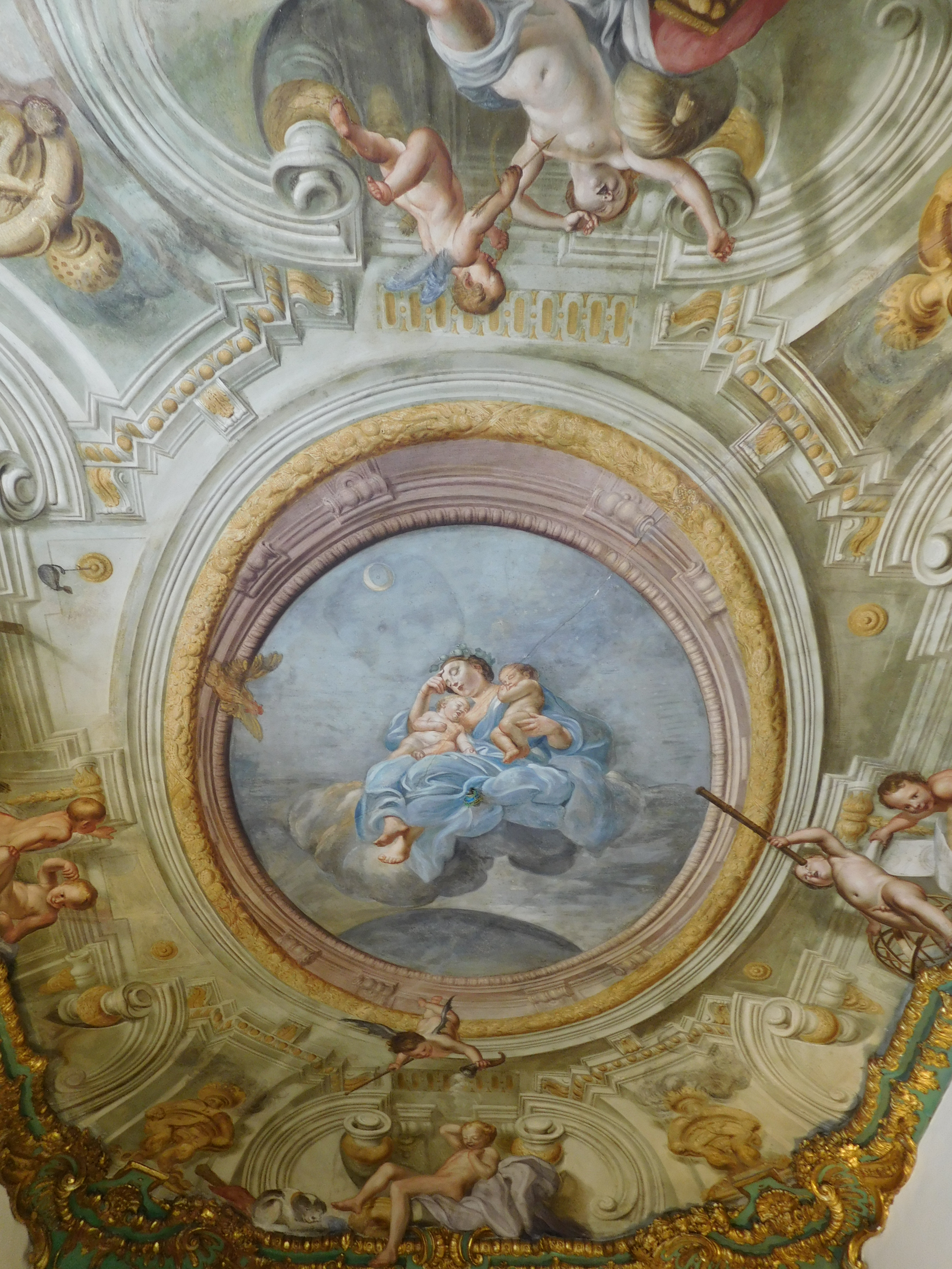 Palazzo Agostino Spinola (o Palazzo Doria De Ferrari), Genova